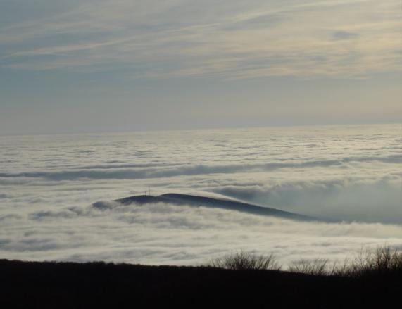 Köd a Kékes tetőről Gyöngyös felé nézve